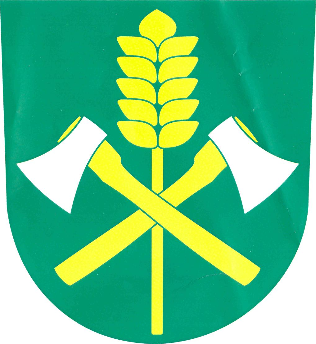 Znak obce Sukorady (okres Mladá Boleslav)